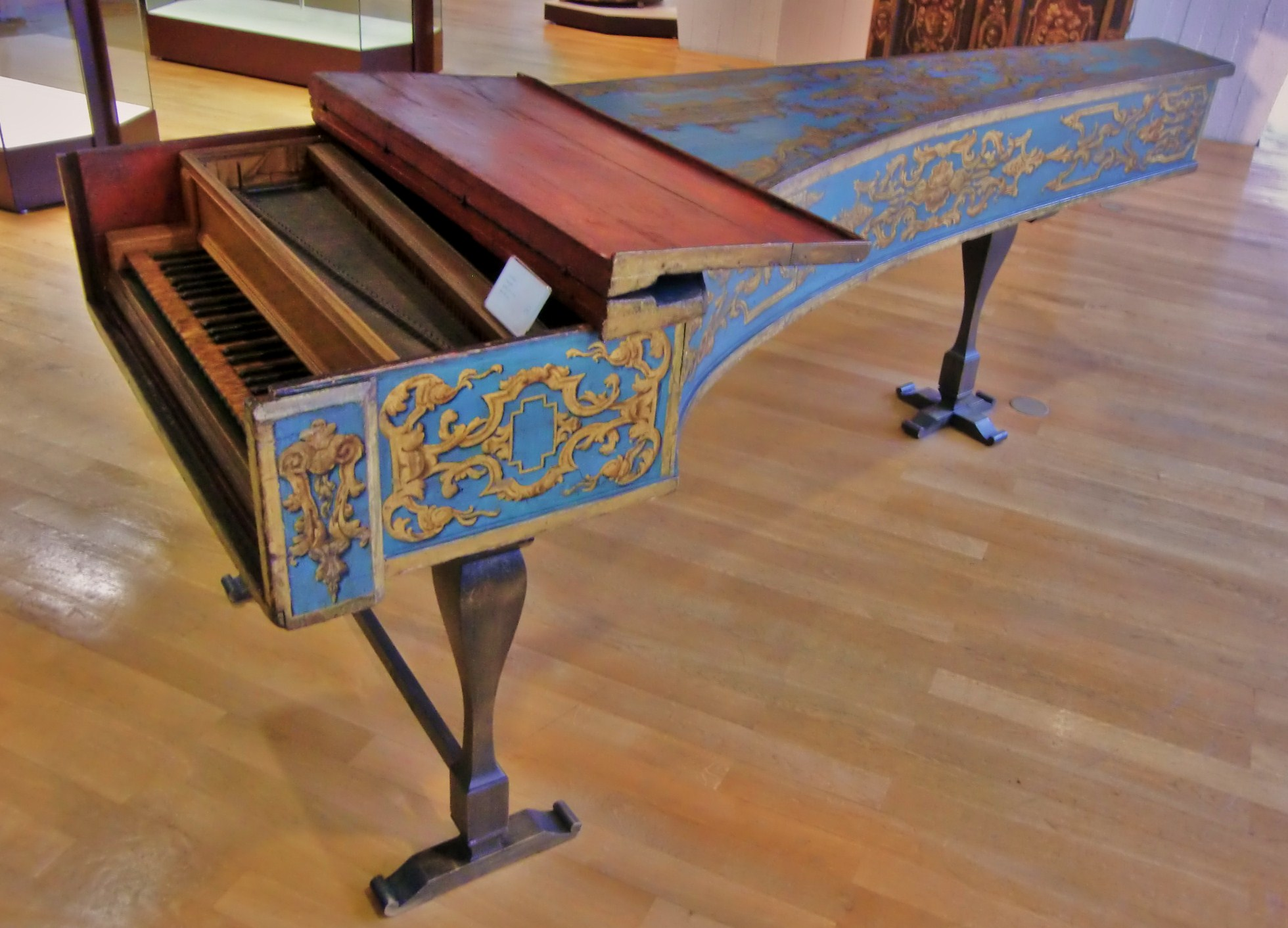 Clavecin italien anonyme (vers 1700) - Berlin, Musikinstrumentenmuseum